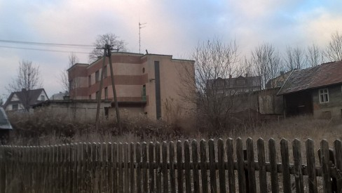 Zwardoń, budynek po byłej Strażnicy Wojsk Ochrony Pogranicza Zwardoń (WOP), od 16 maja 1991 roku Strażnica Straży Granicznej w Zwardoniu do 3 stycznia 2003 roku.